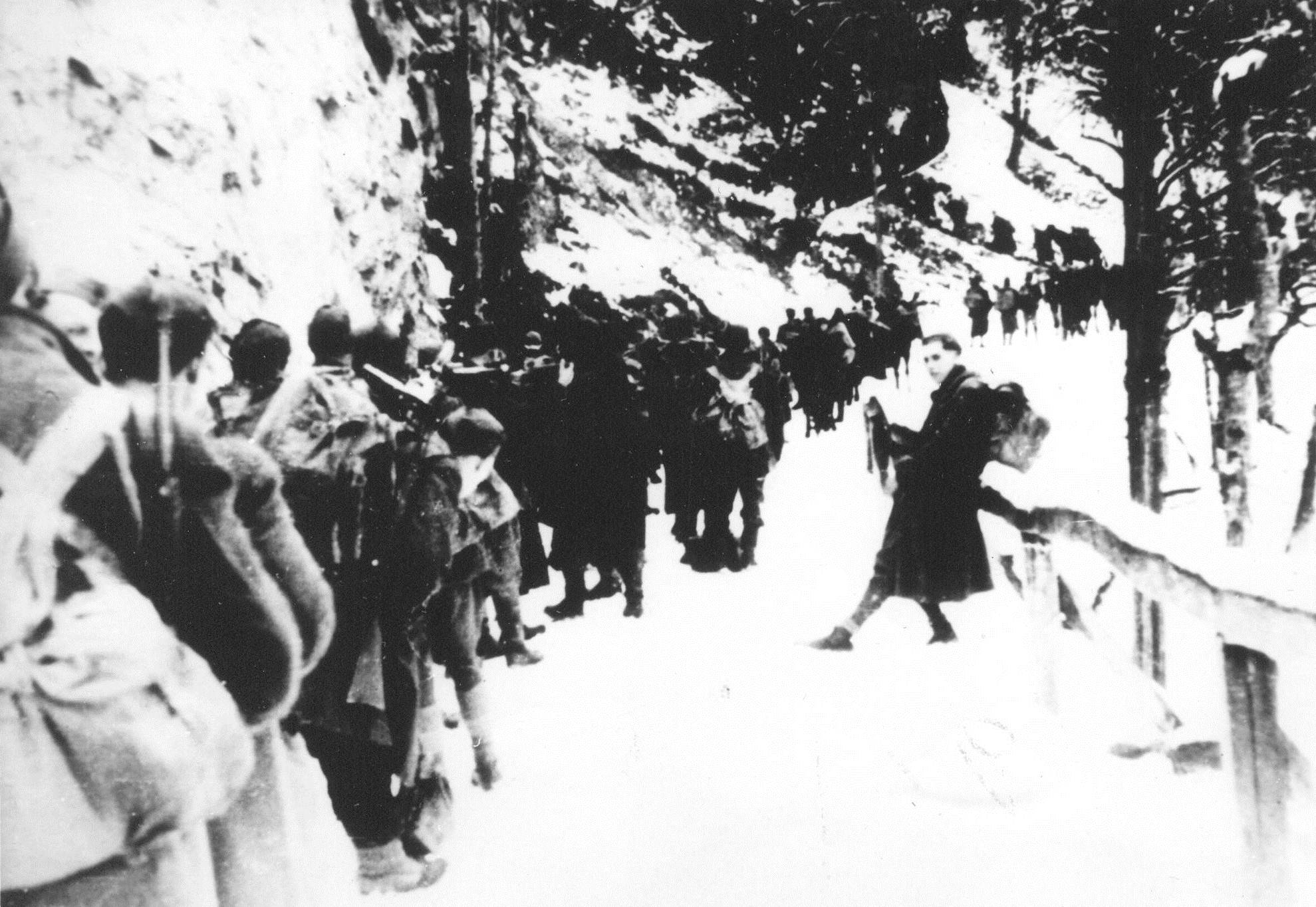 Borci XIV. divizije na pohodu na Štajersko.